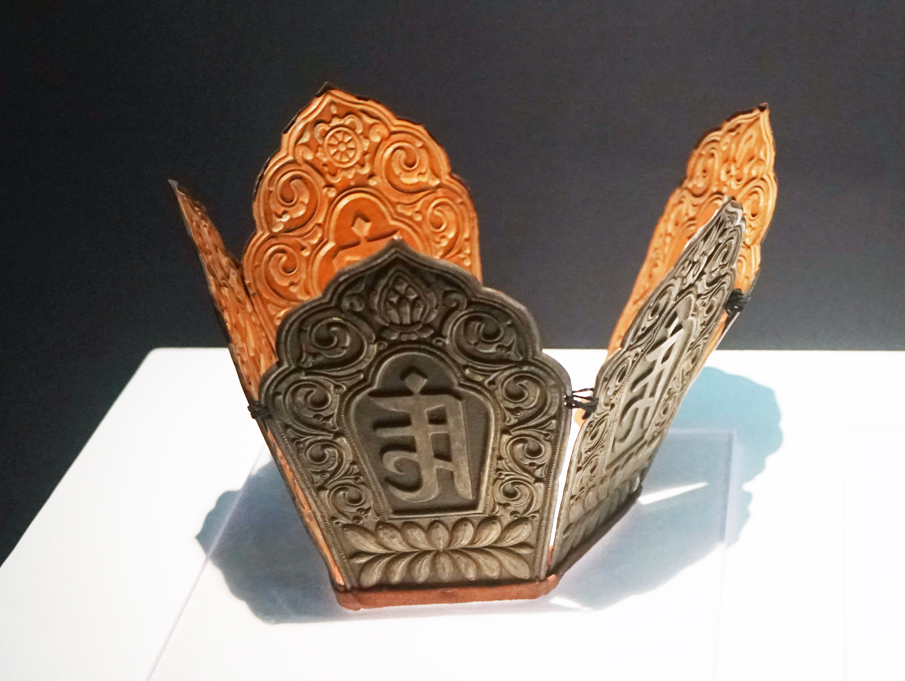 中文（中国大陆）: 喇嘛头饰。清代。腰新乡后新村征集